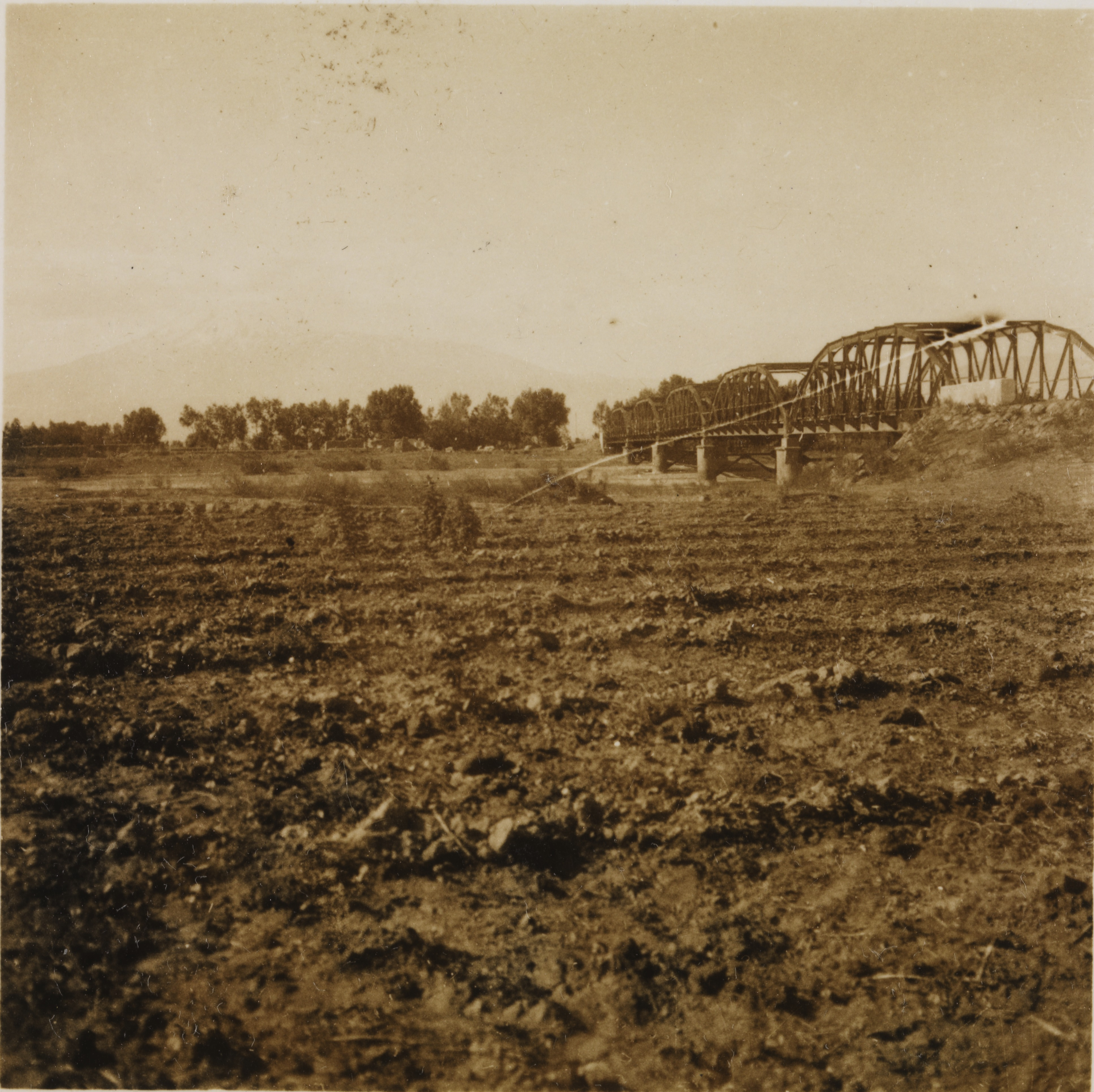 En moderne jernbro over elven Araks utenfor landsbyen Markara. Ett av bildene fra reisen gjennom Armenia i perioden 7 juni til 2 juli 1925. På anmodning fra Det Internasjonale Arbeidsbyrå (ILO) og Folkeforbundet reiste Fridtjof Nansen sammen med en utpekt kommisjon sakkyndige for å besøke landet og undersøke planer for kunstig vanning av ørkenområder med tanke på å overføre armenske flyktninger dit. Depicted place: Armenia